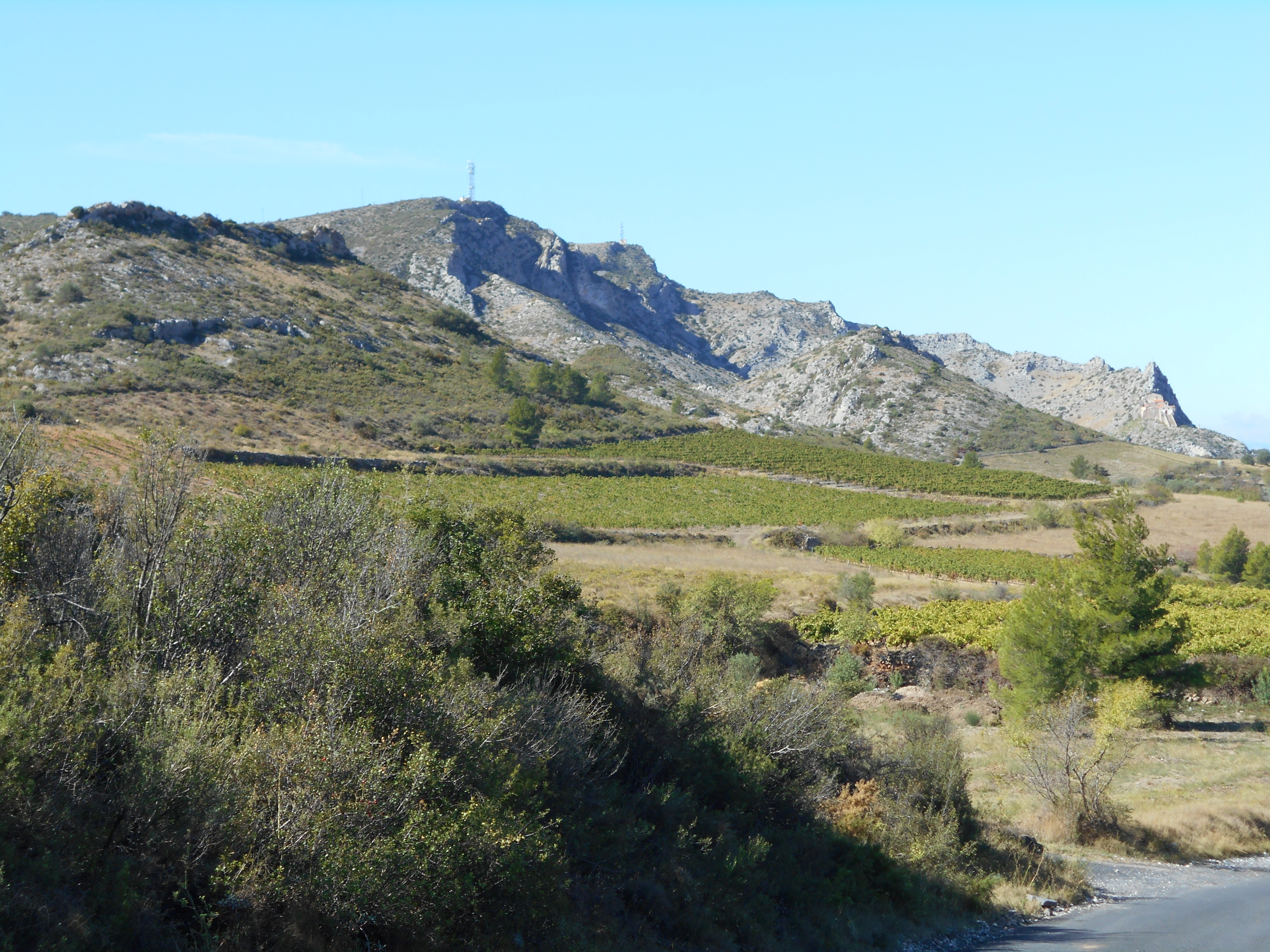 La Serra de Pena, entre Cases de Peena i Baixàs